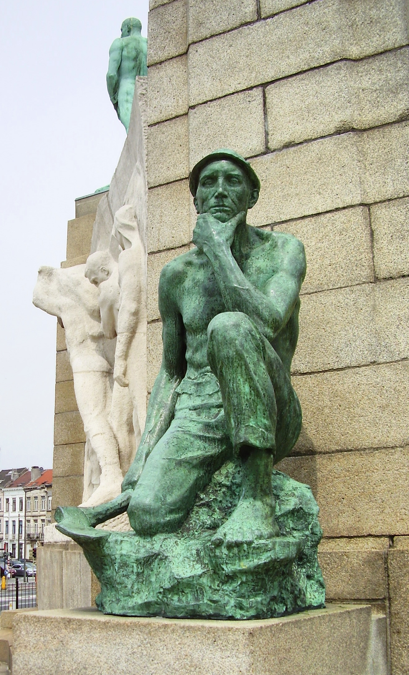 Description: Monument au Travail, Bruxelles - Le Mineur, Constantin Meunier Author: User:Ben2 Date of creation: 20 juin 2006 Source: Photo personnelle